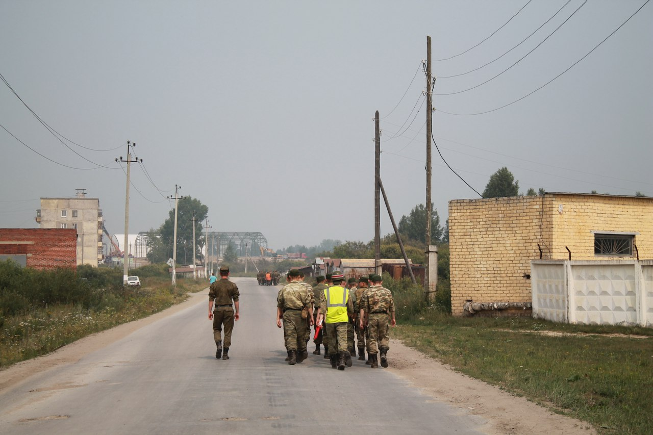 Улица военного городка в Еланском (Свердловская область). Лето 2016 года